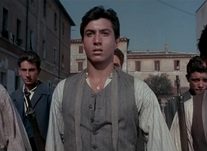 Scena dal film Amori di mezzo secolo